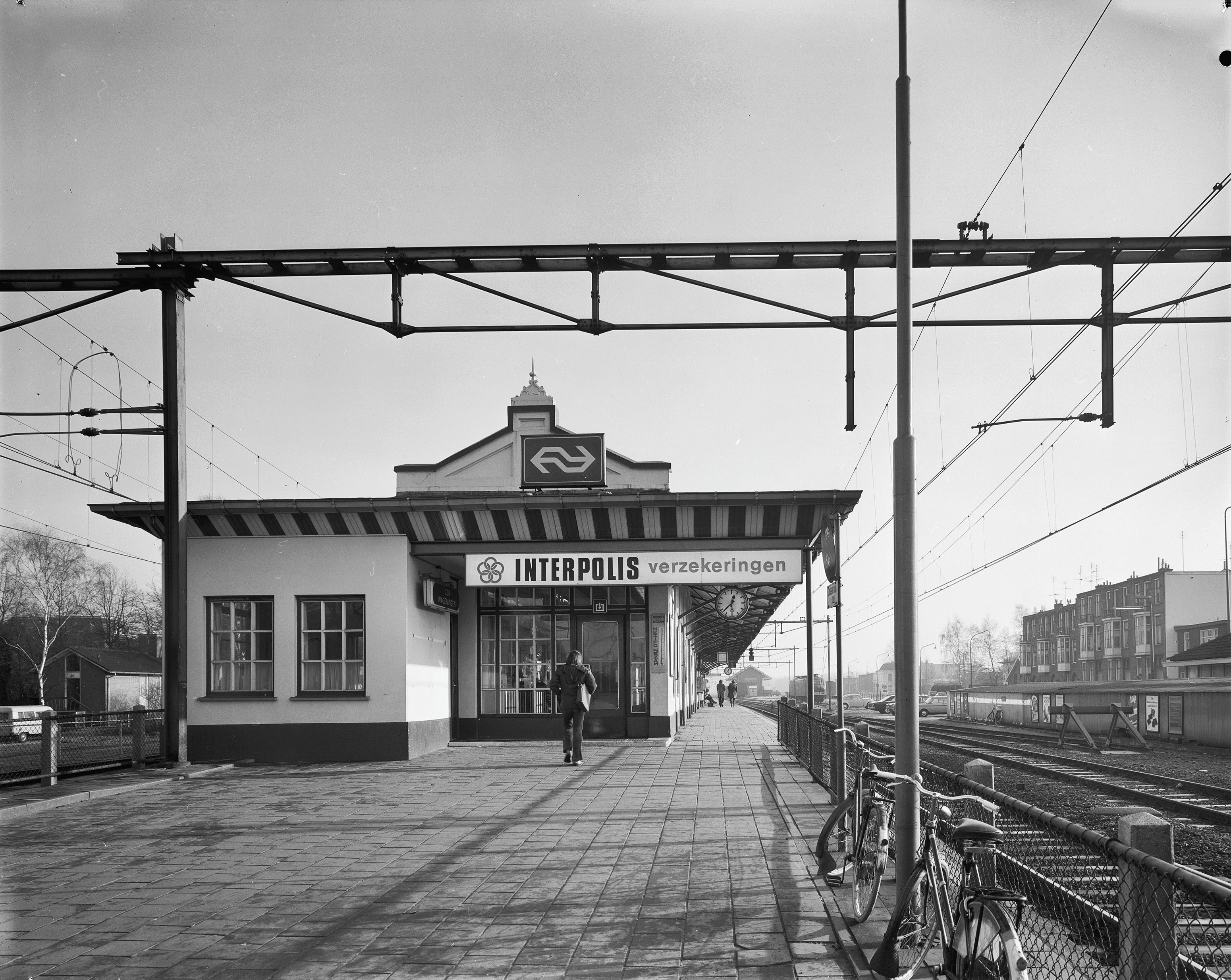 Station Ede- Wageningen: ingang